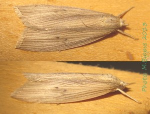 Chilo sacchariphagus ssp. sacchariphagus (Bojer, 1856)